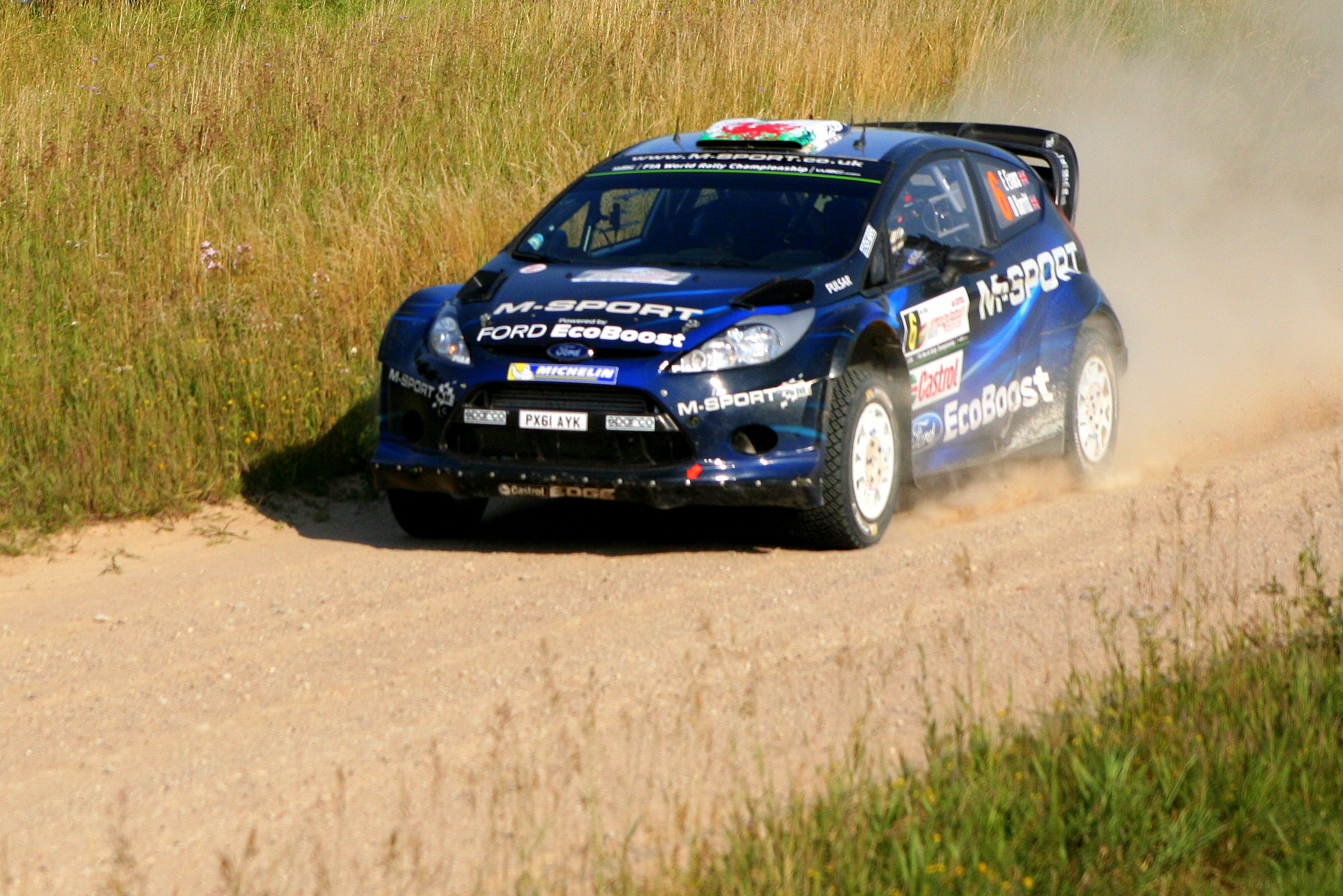 Elfyn Evans podczas Rajdu Polski 2014